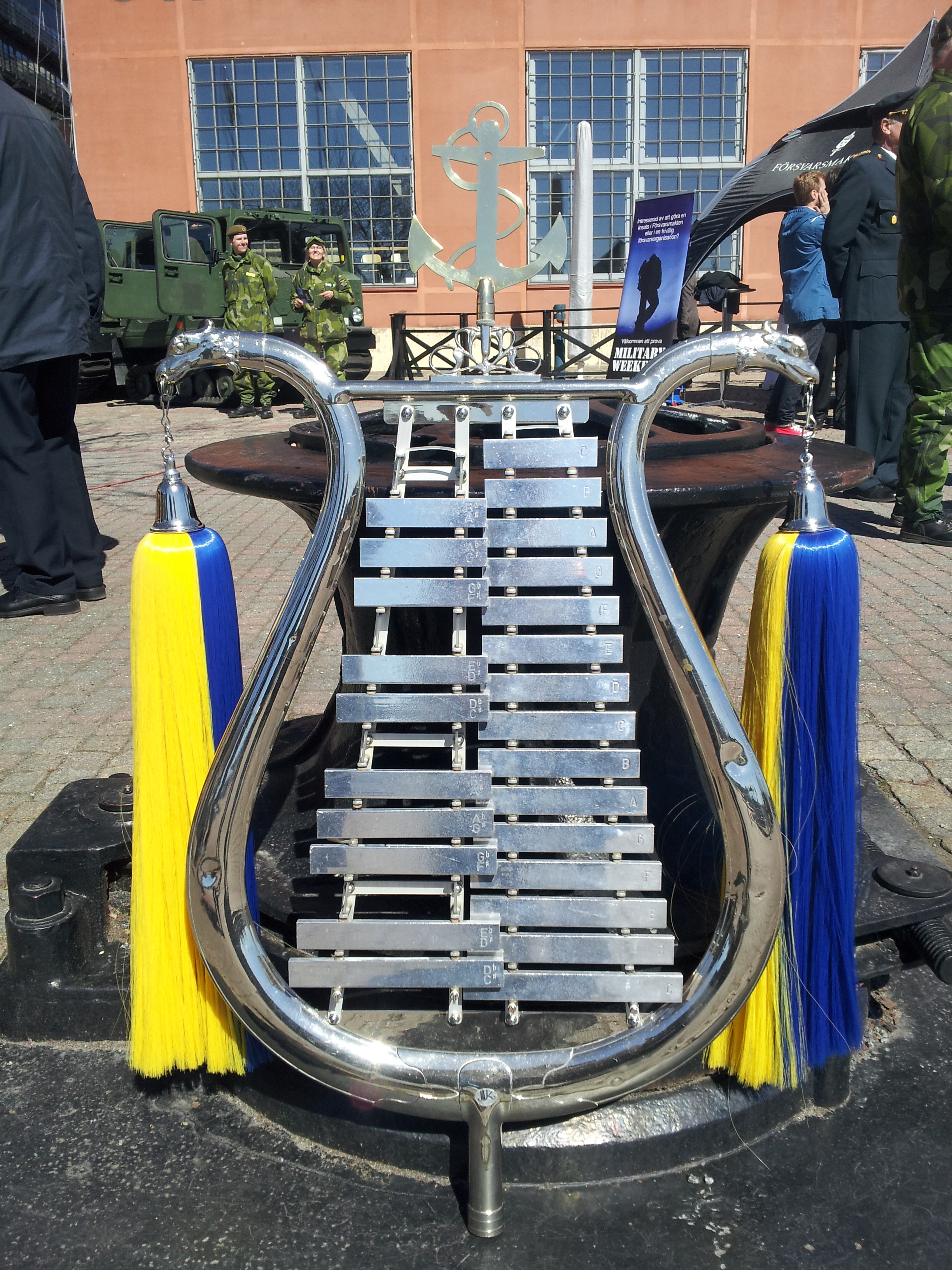 slagverksinstrument